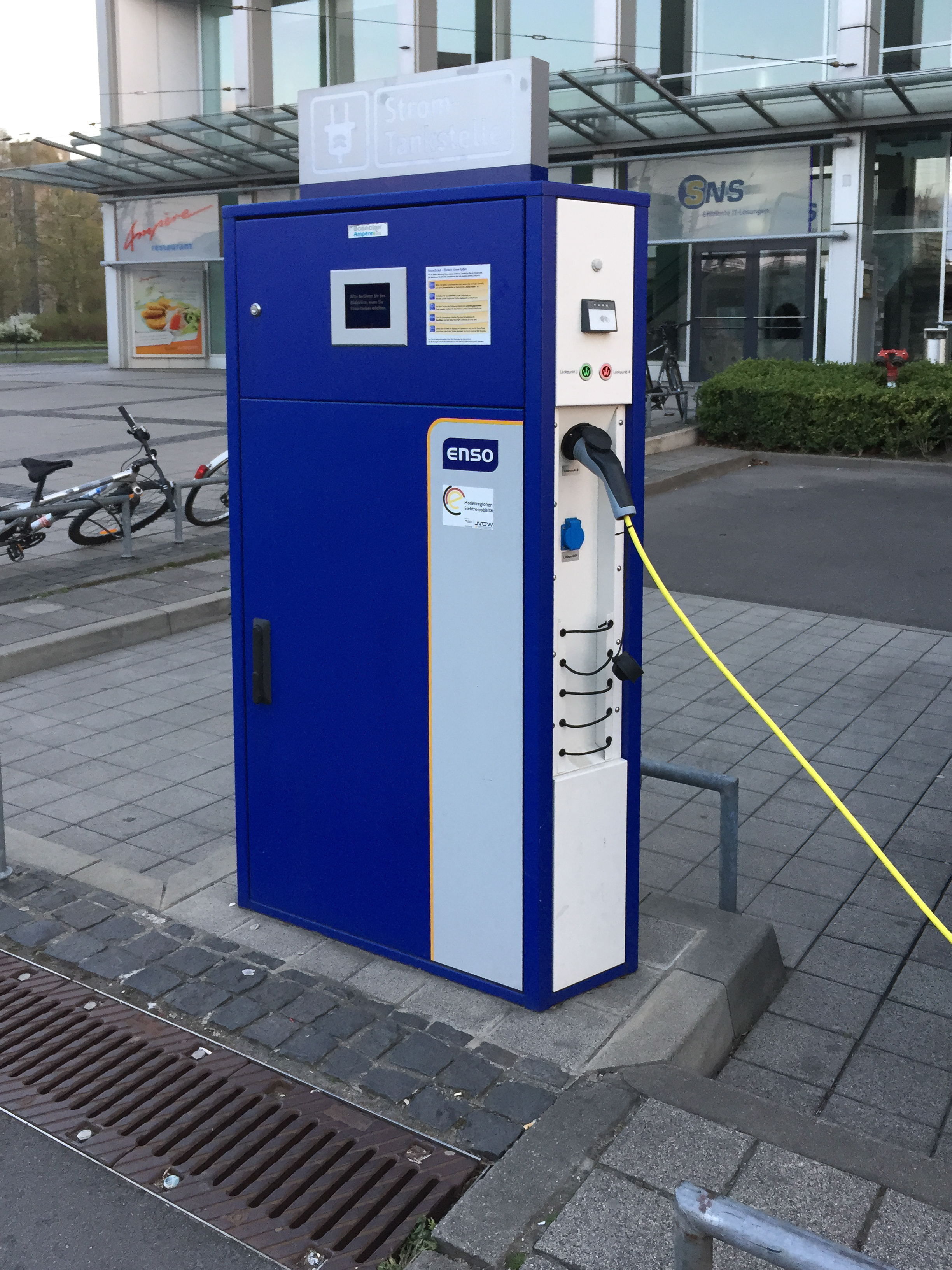 Elektrotankstelle Dresden ENSO am Hauptbahnhof (Süd, Bayrische Straße)